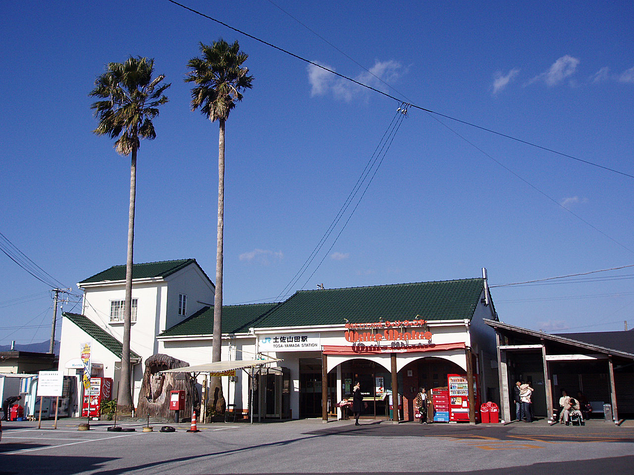 Shikoku Railway Dosan Line Tosa-Yamada Station 四国旅客鉄道 土讃線 土佐山田駅